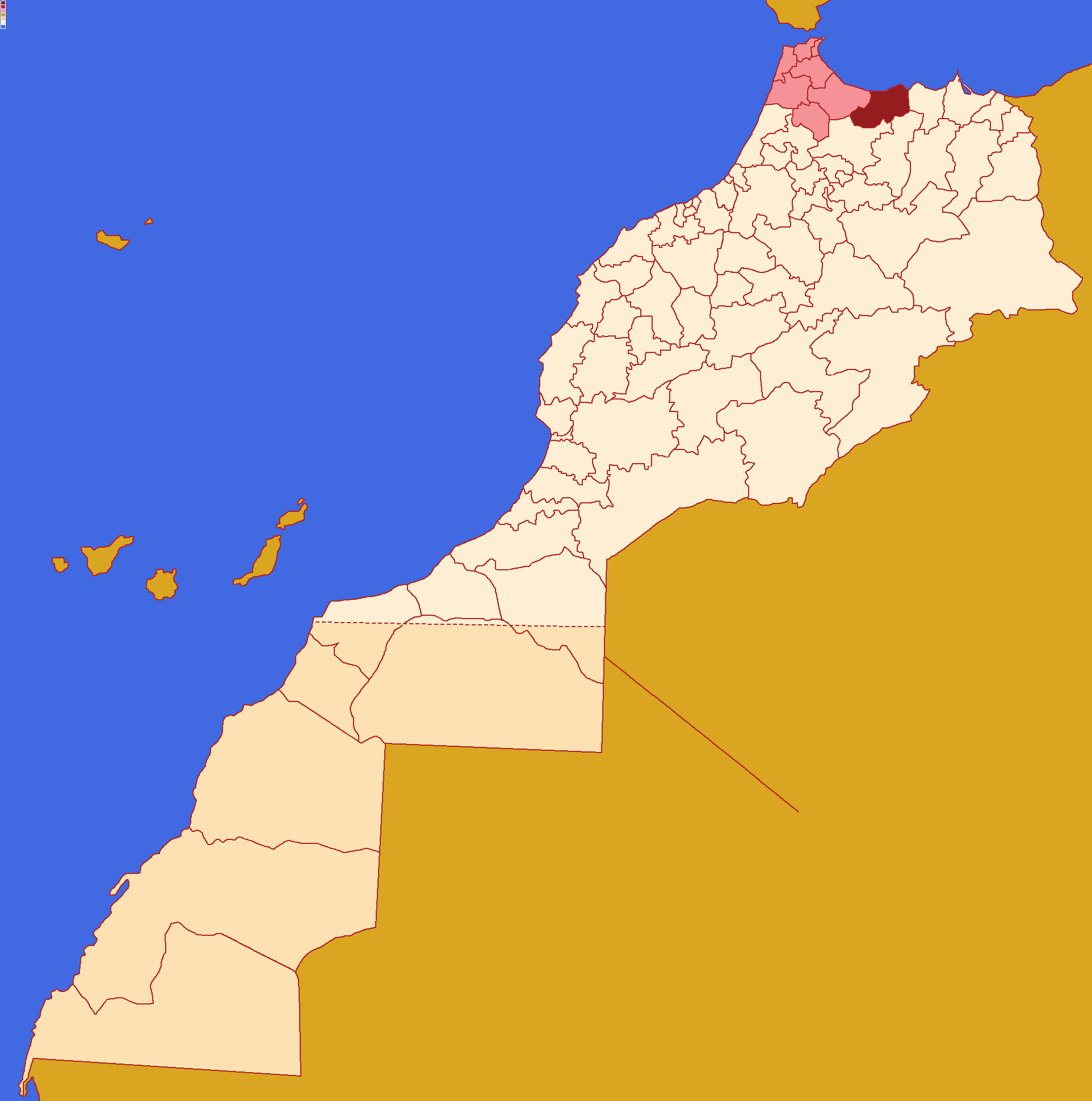 Localização da província de Al Hoceima dentro da região de Tânger-Tetuão-Al Hoceïma e dentro de Marrocos. Conforme a reforma administrativa de 2015.